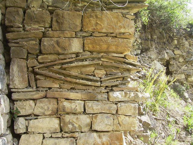 El "ojo del Puma", Provincia de Luya, Región Amazonas, Perú